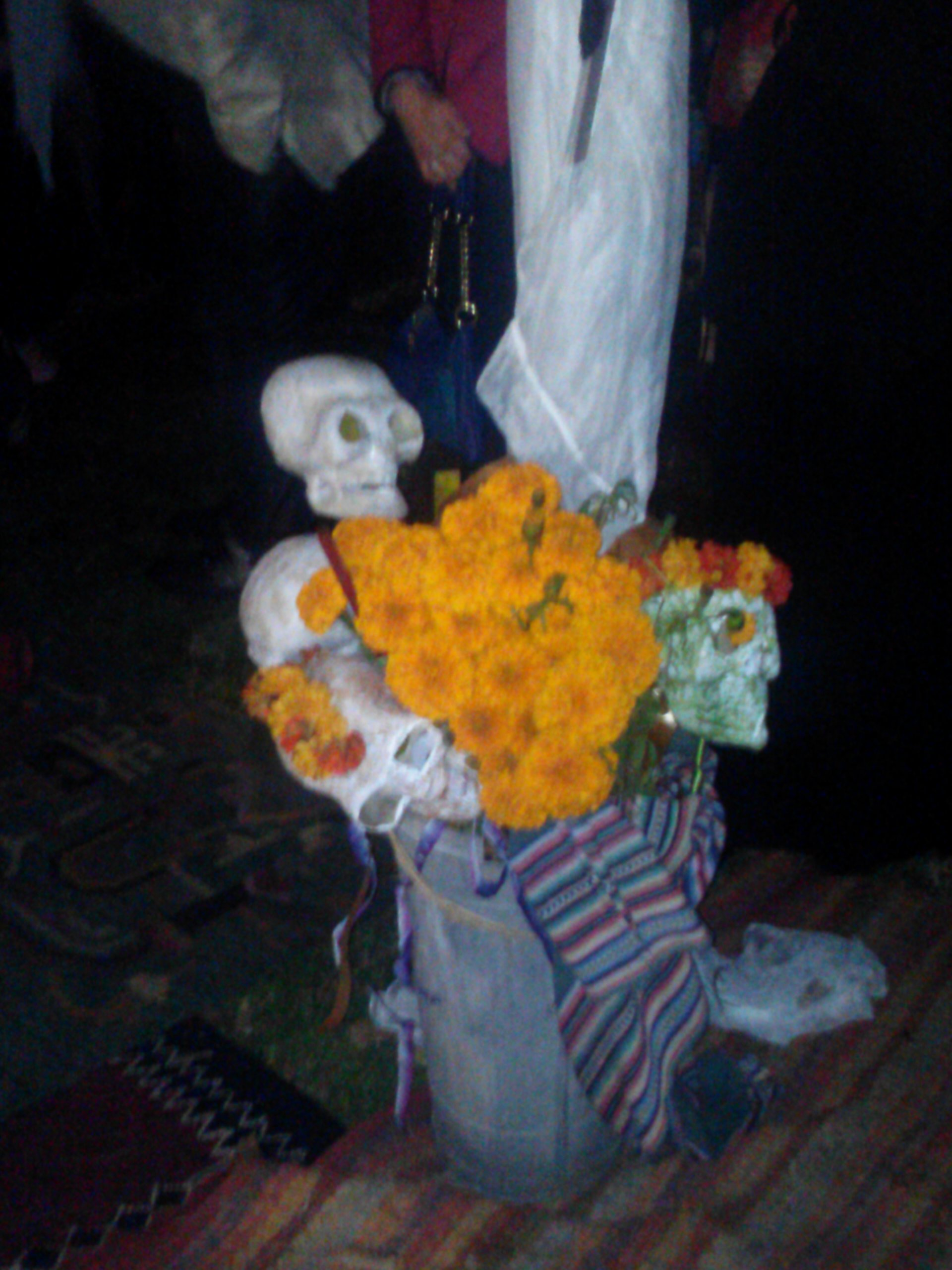 With skulls and marigold